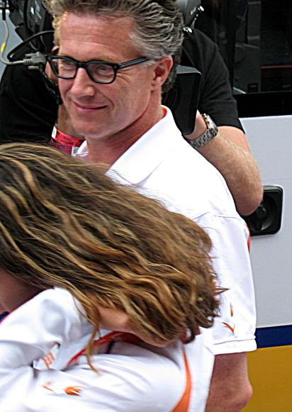 Charles van Commenée, Nederlands voormalig chef de mission.